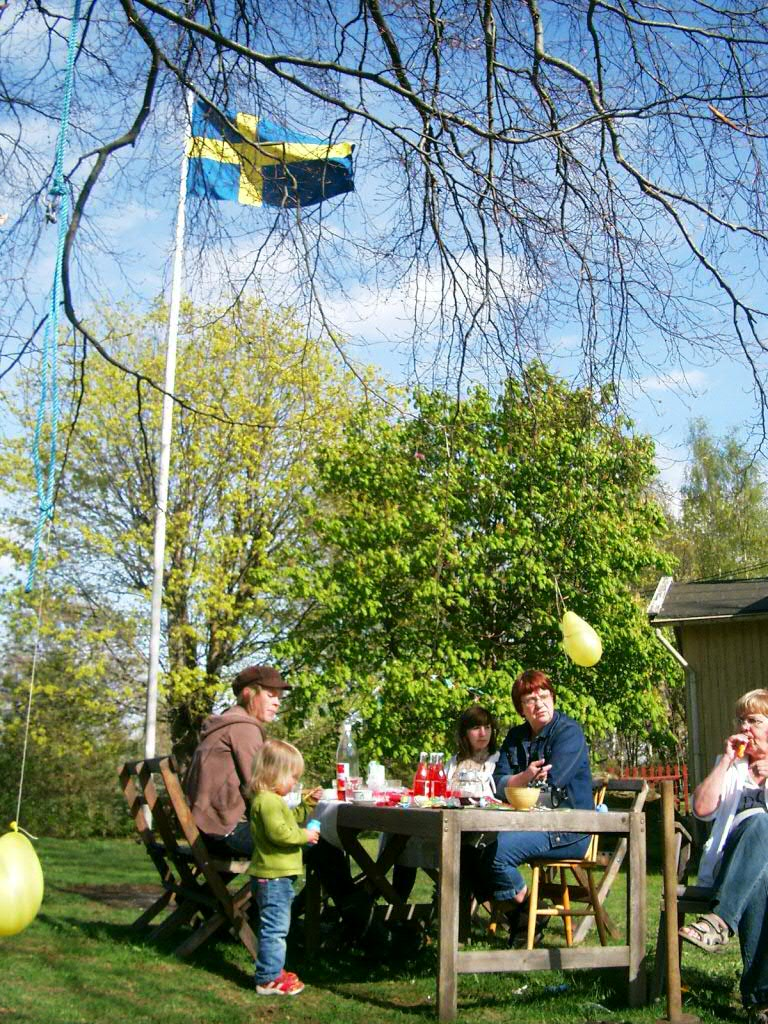 Fika!